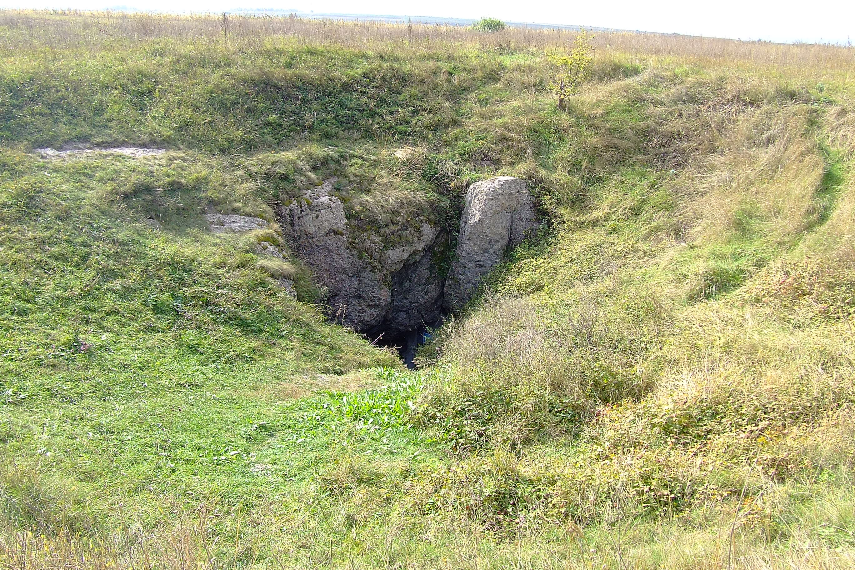 «Печера Вертеба»